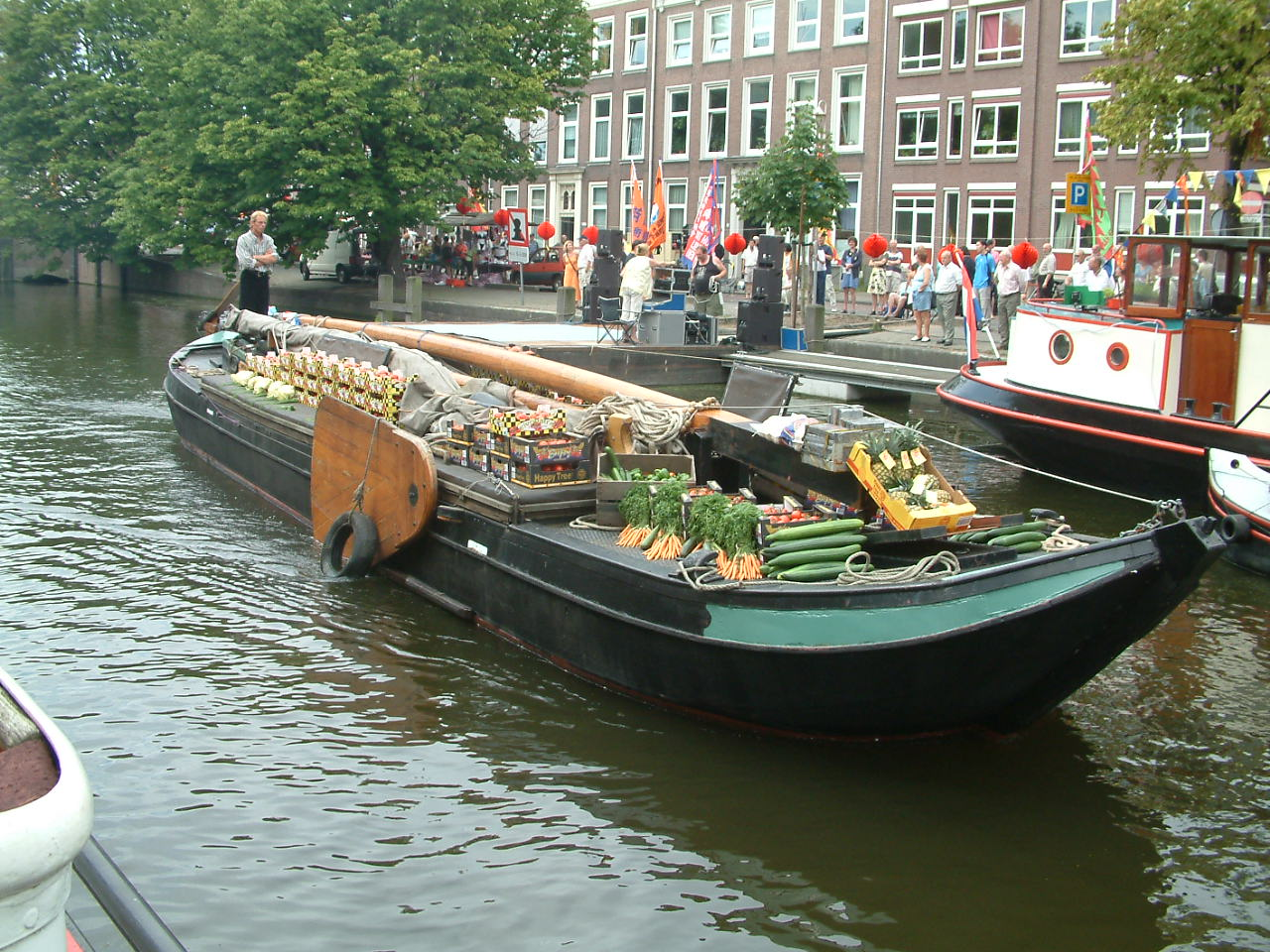 Een westlander vaart langs de Bierkade in Den Haag tijdens de LVBHB reunie in 2004